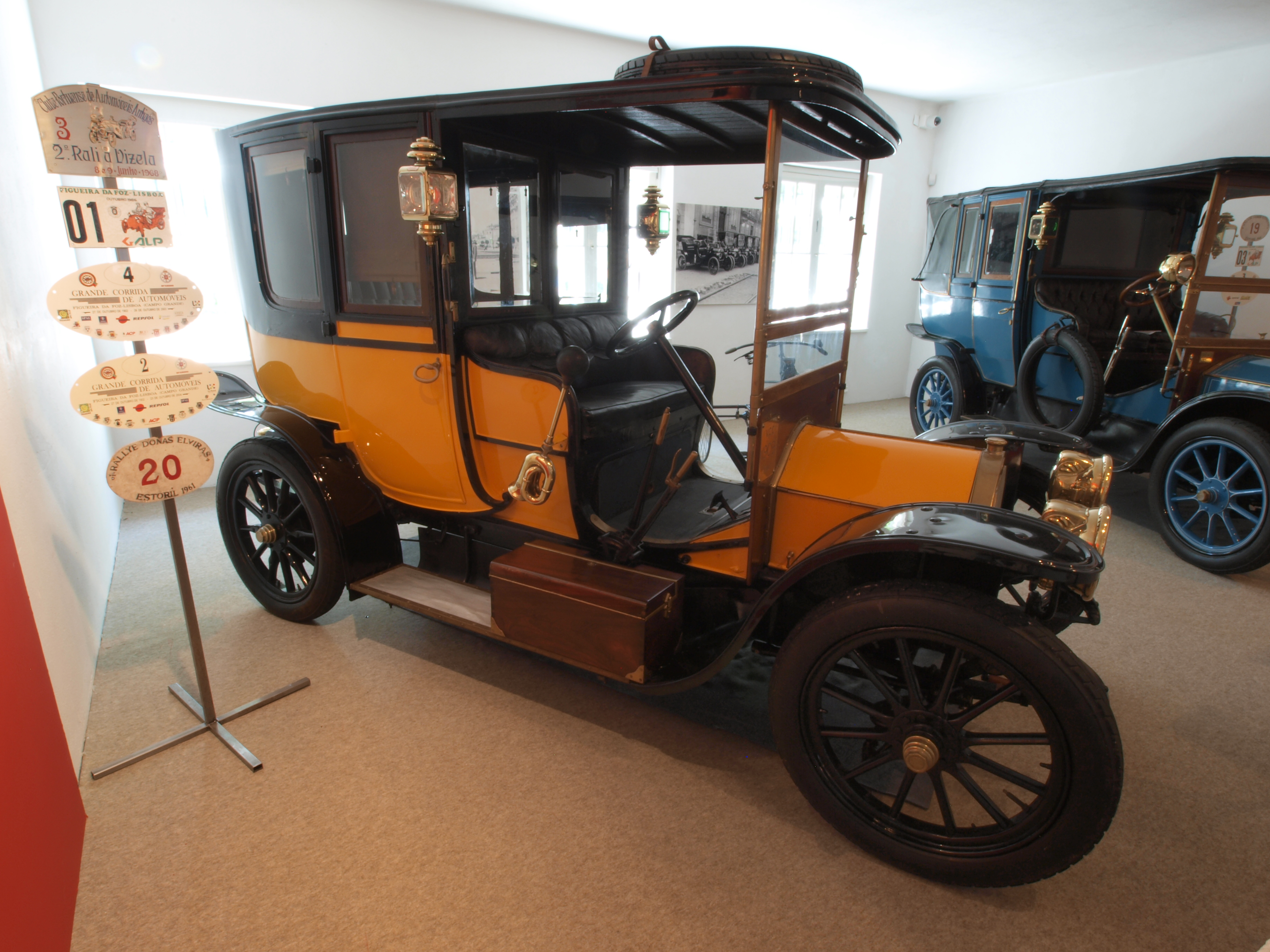 Photographed at the Caramulo museum, 'Museu do Caramulo', Caramulo, Portugal. OLYMPUS DIGITAL CAMERA